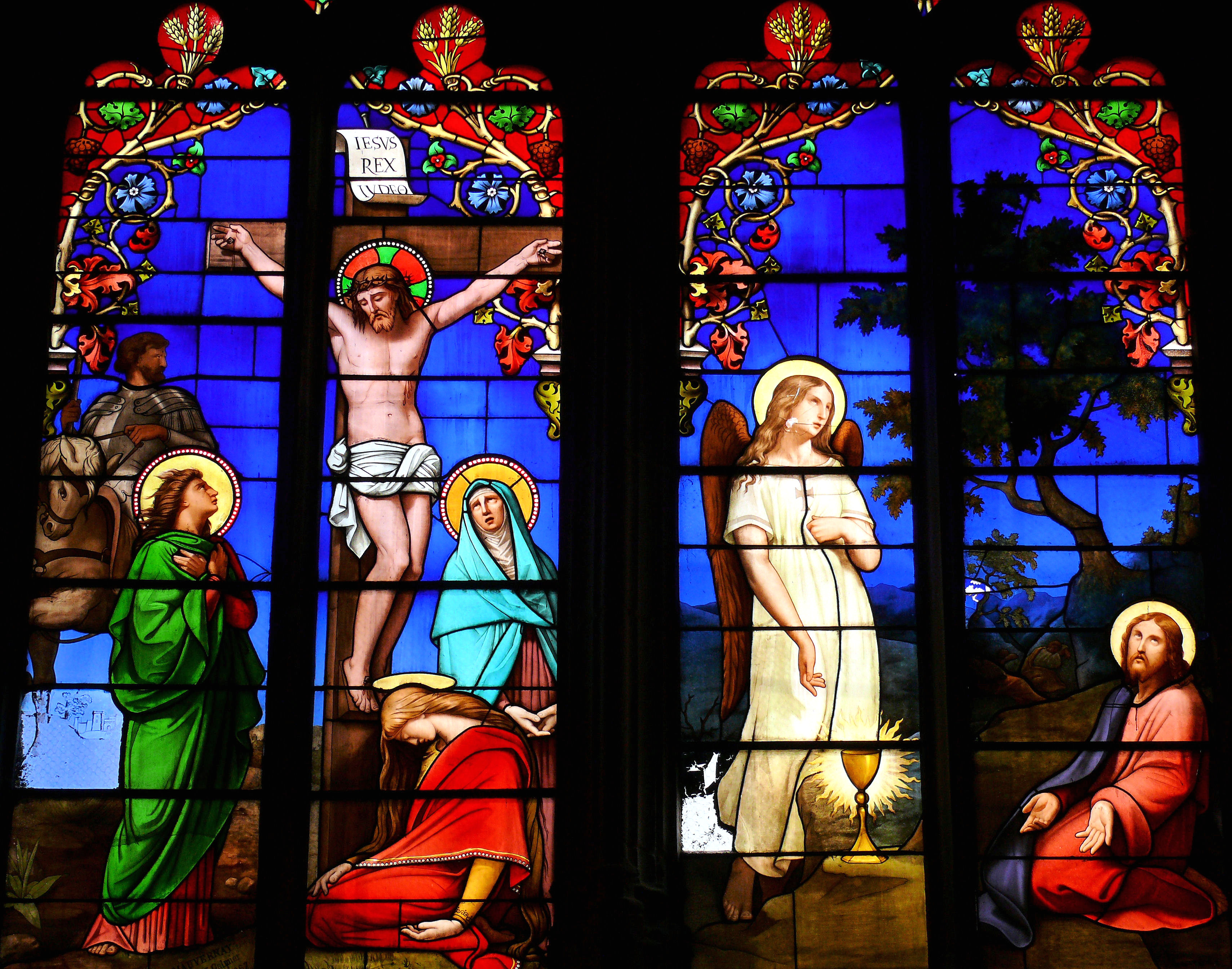 Montbrison - Collégiale Notre-Dame d'Espérance - Vitrail